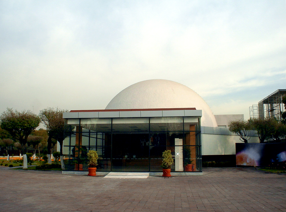 PLANETARIO LUIS ENRIQUE ERRO